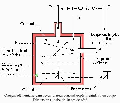 To-T experience